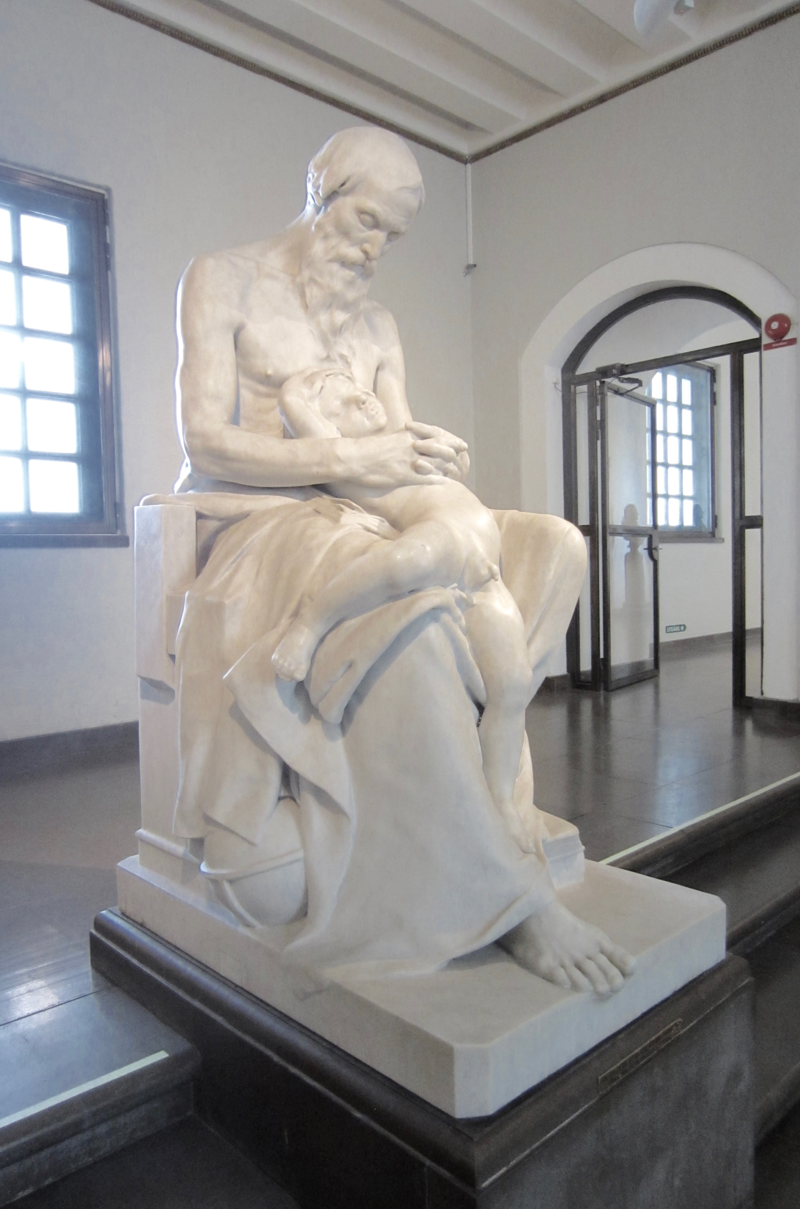 Per Hasselberg, 1850-1894, huggen av Christian Eriksson, 1896. This is a photo of an artwork at the Gothenburg Museum of Art in Sweden with the identifier: Sk 164